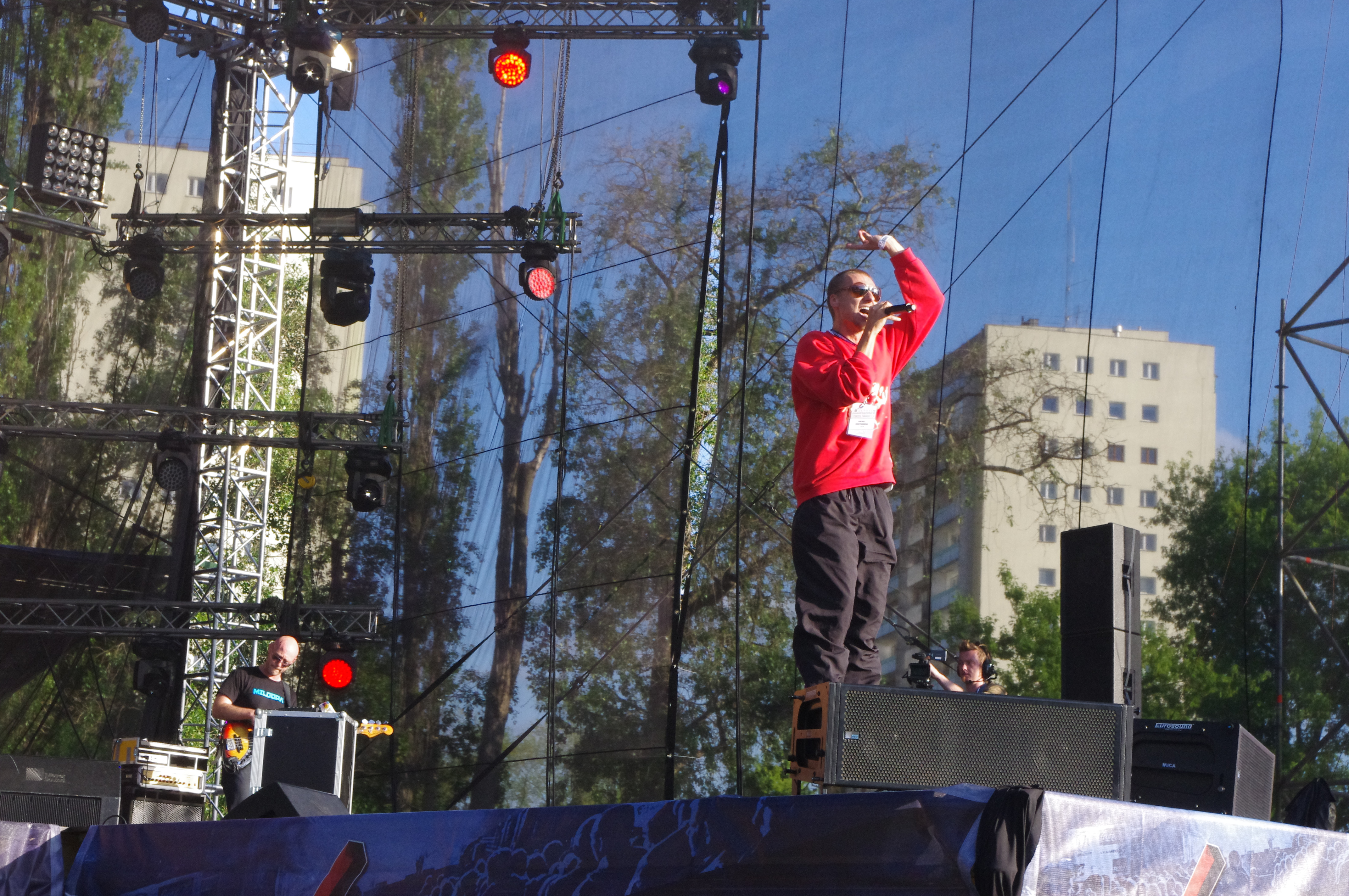 L.U.C podczas koncertu na Juwenaliach Politechniki Warszawskiej – 18 maja 2012 na Stadionie Syrenki w Warszawie